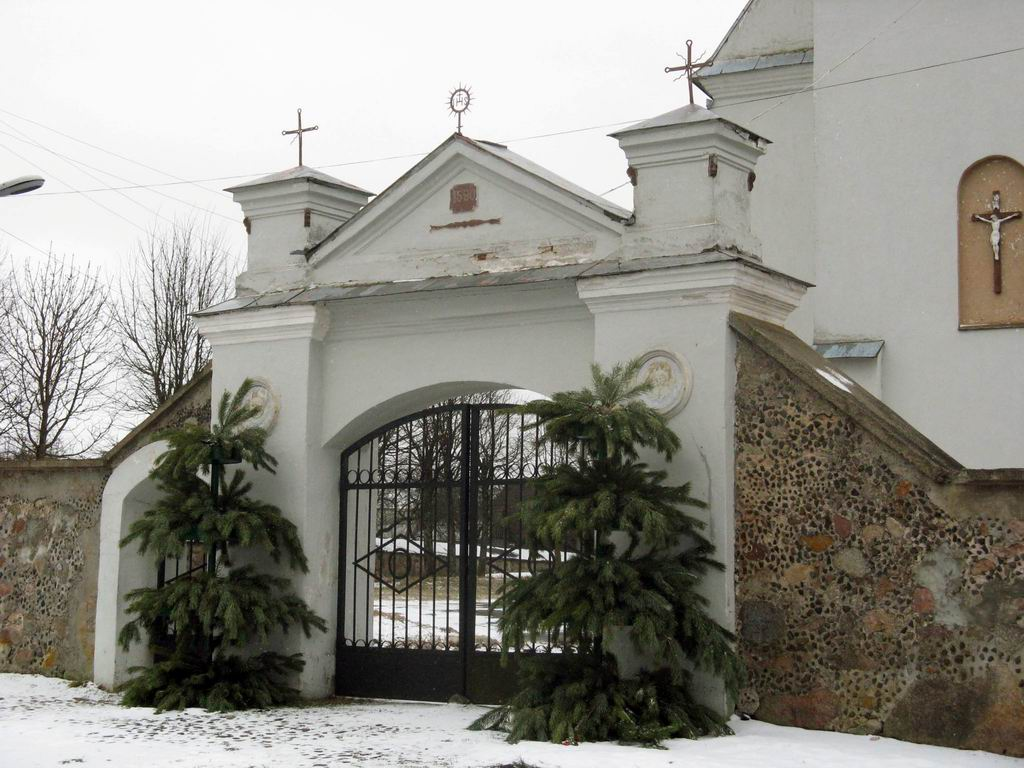 Беларуская (тарашкевіца): Дзераўная